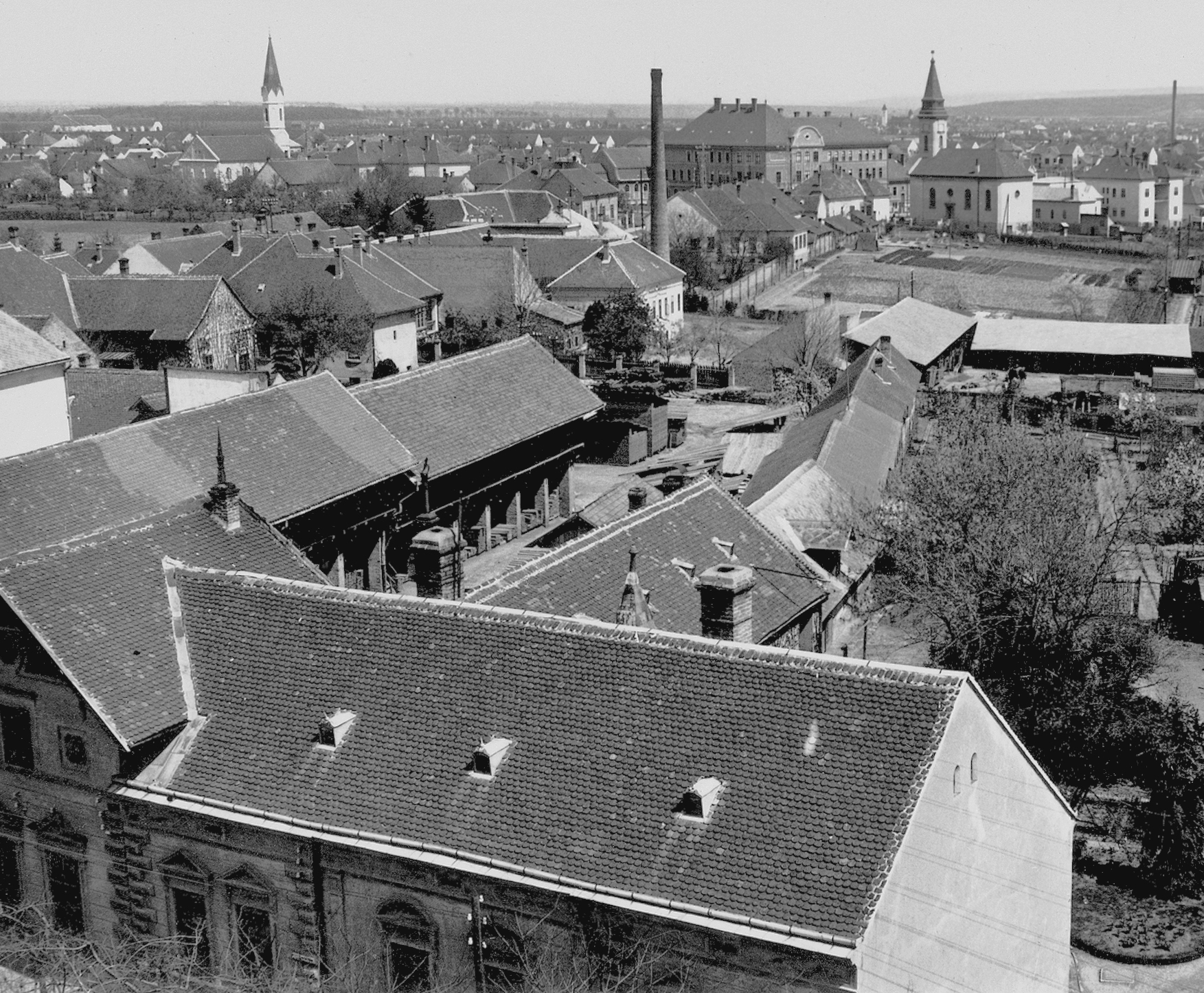 látkép a Zrínyi Ilona Általános Iskola tűztornyából. Távolban balra az evangélikus templom, középen az Illyés gimnázium, jobbra a református templom látszik. Location: Hungary, Dombóvár Tags: picture, chimney Title: látkép a Zrínyi Ilona Általános Iskola tűztornyából. Távolban balra az evangélikus templom, középen az Illyés gimnázium, jobbra a református templom látszik.